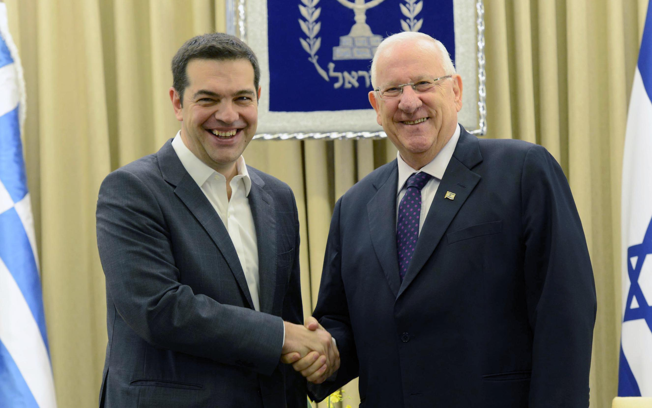 ראש ממשל יוון אלכסיס ציפראס משמאל בעת ביקורו בישראל עם נשיא מדינת ישראל ראובן ריבלין